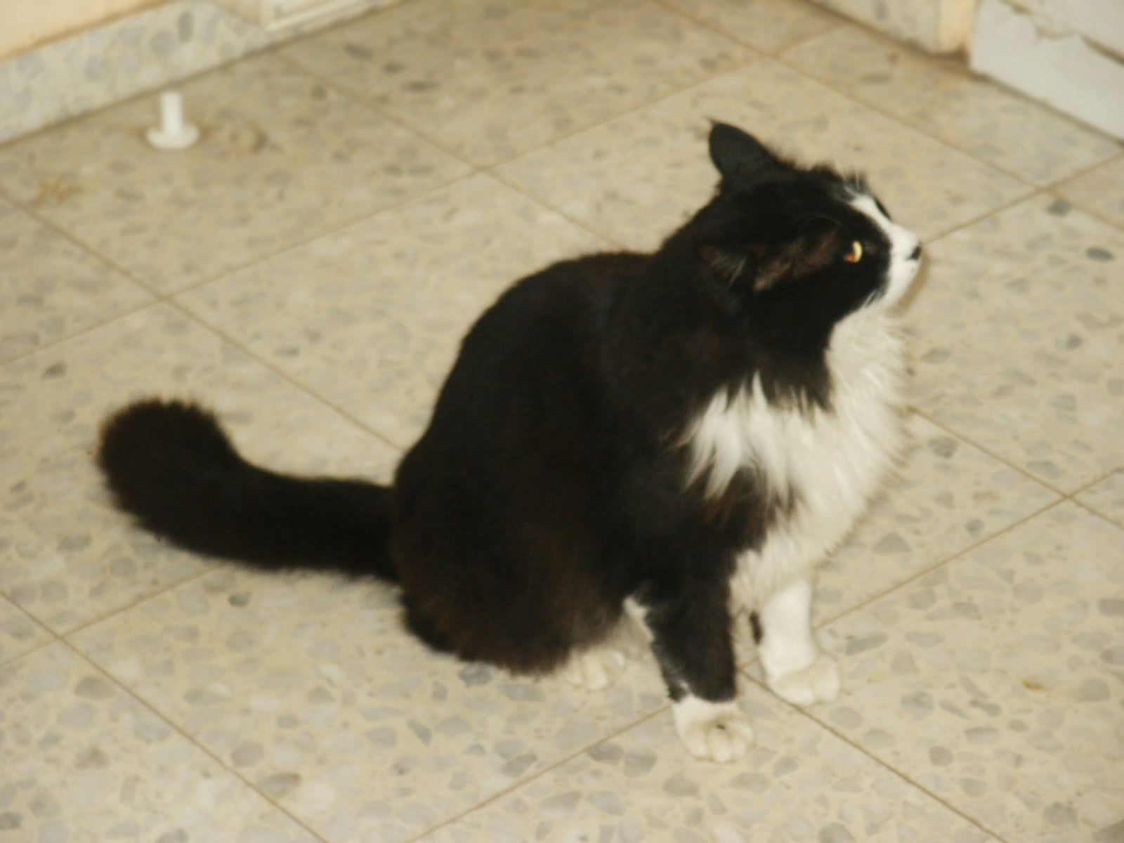 חתול מסוג מיין קון